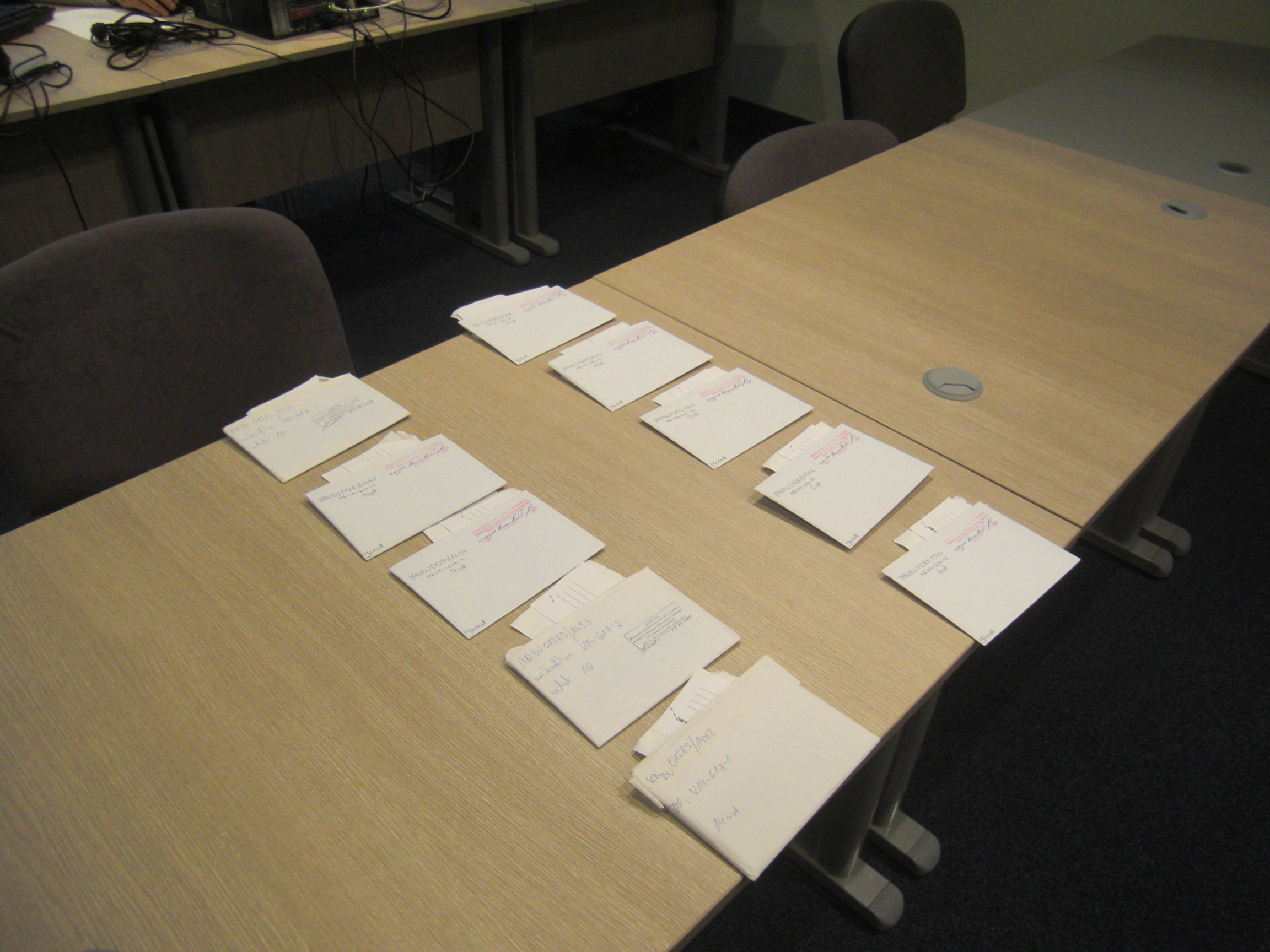 W czytelni Instytutu Pamięci Narodowej przy Placu Krasińskich, sprawa obiektowa "Doba"